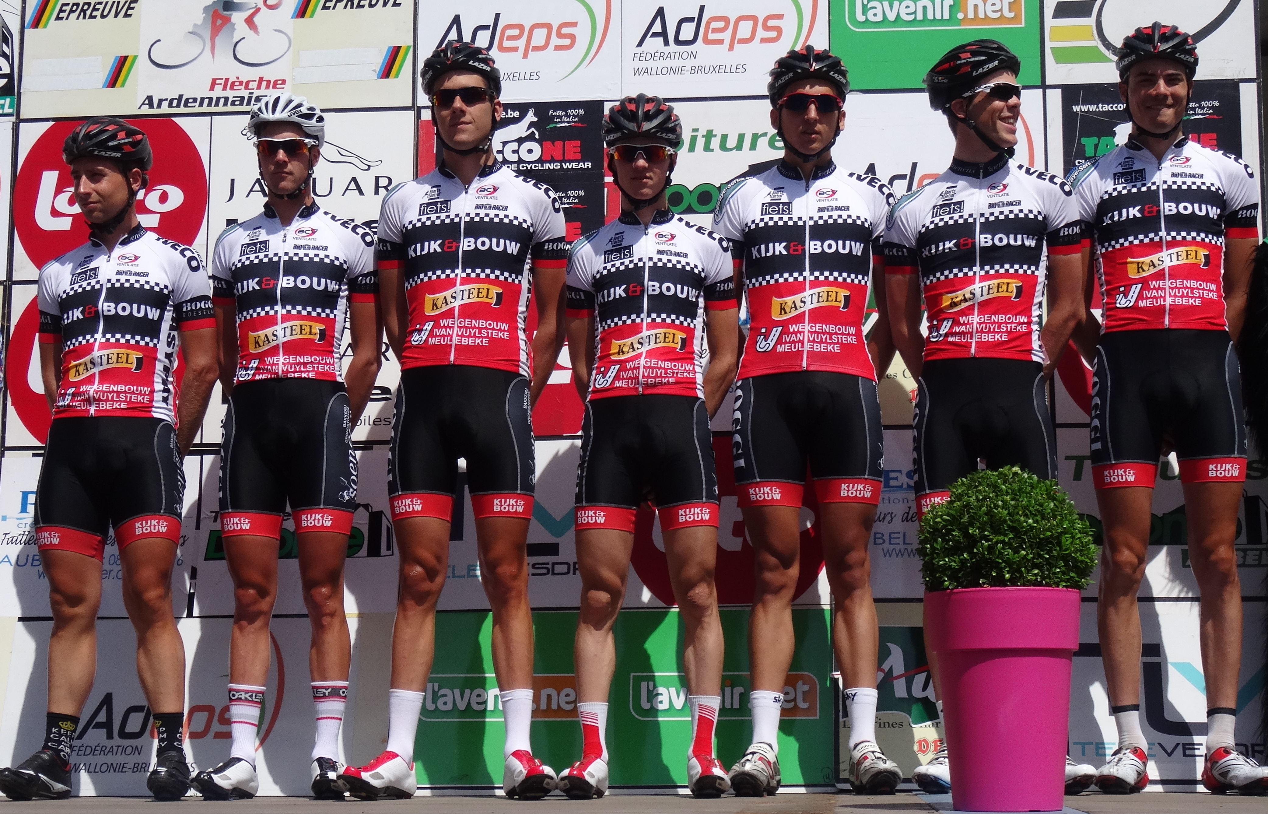 Reportage photographique réalisé le dimanche 22 juin à l'occasion du départ et de l'arrivée de la Flèche ardennaise 2014 à Herve, Belgique.